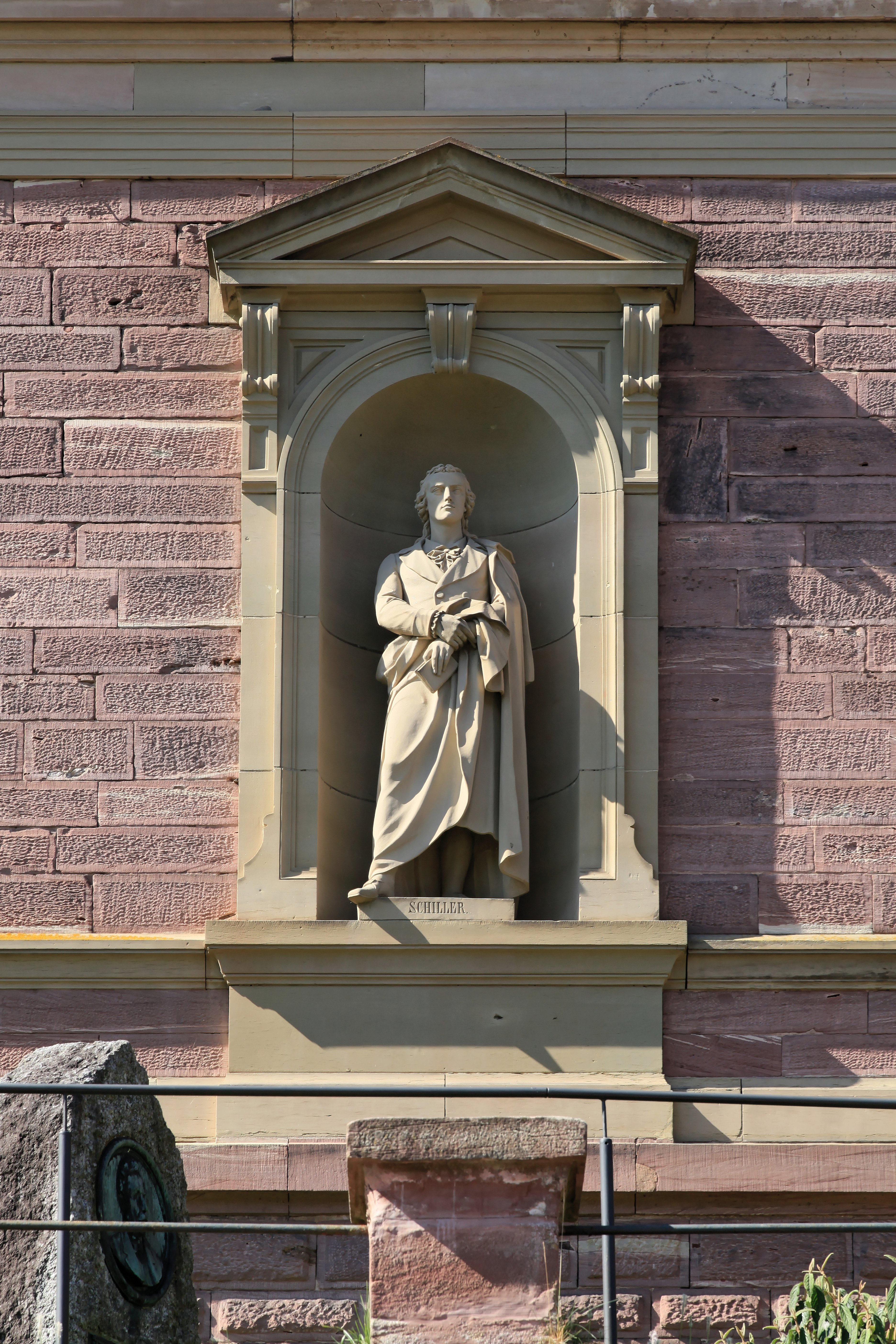 Georgenäum, Im Zwinger 3 in Calw